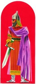 Արշակ Բ